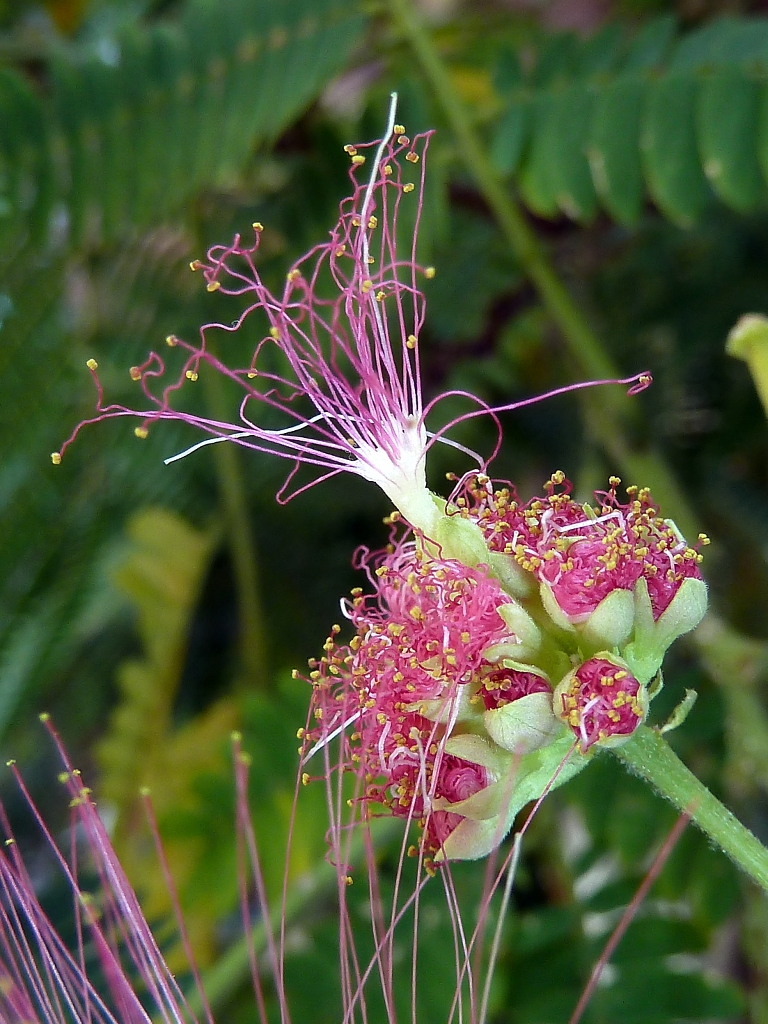 A. j-flor-1.jpg cabezuela en antesis incipiente, con la flor central más precoz y grande - Ornamental, Calle de Narvaez, Madrid Capital (España).